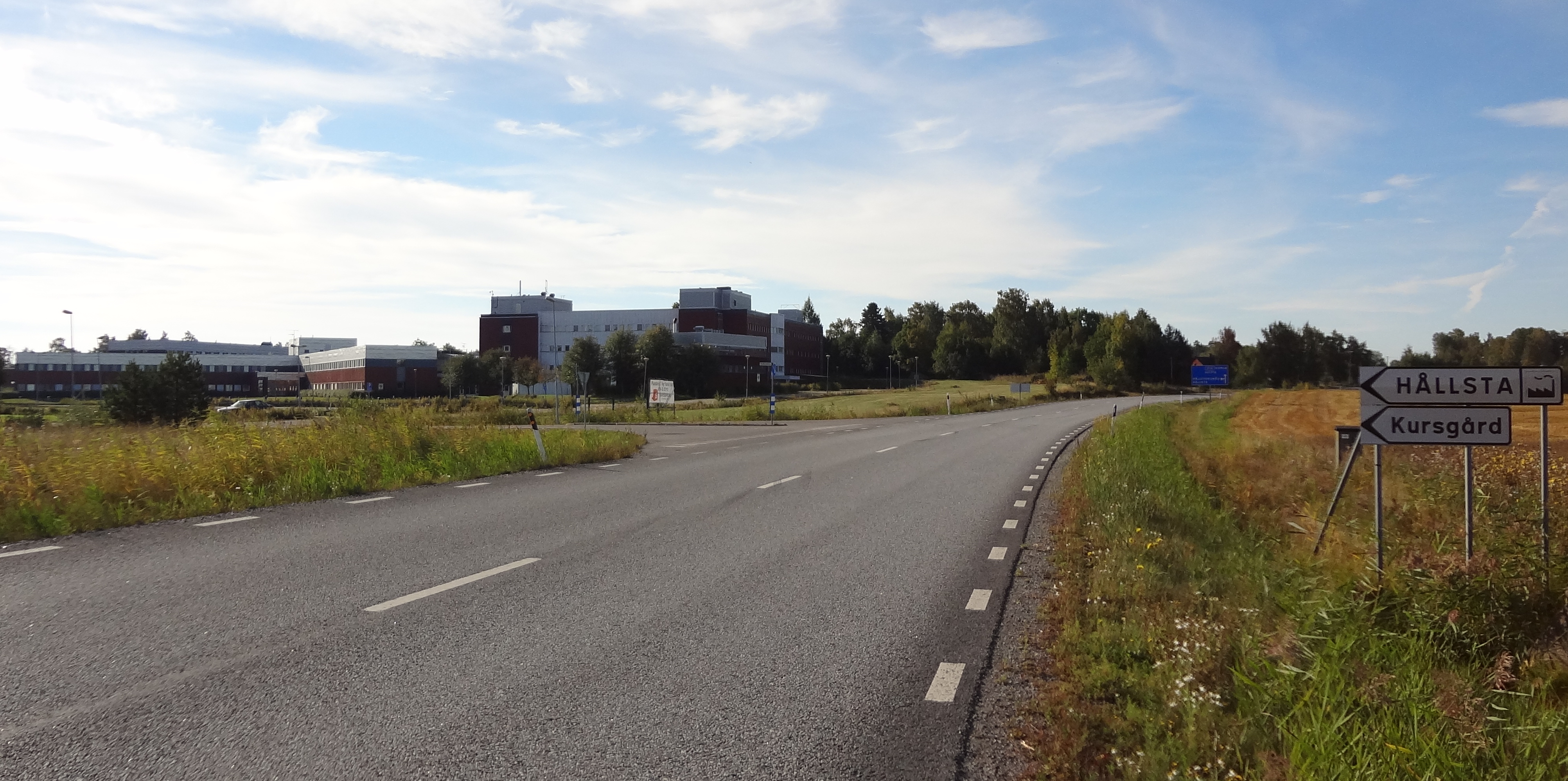 Lantbruksdatas tidigare komplex i Hållsta.